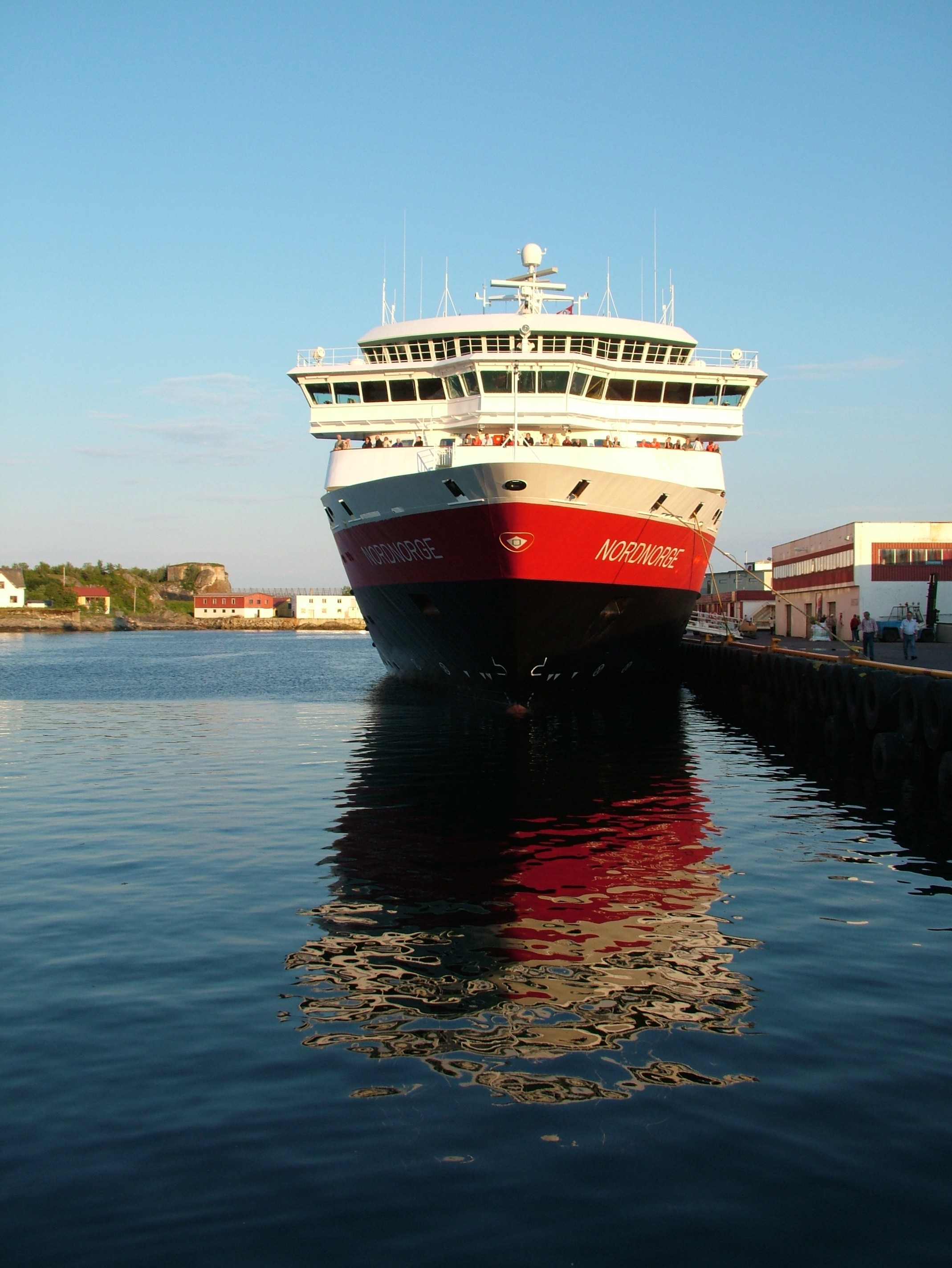 MS Nordnorge in Svolvaer